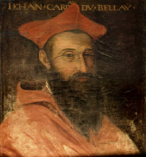 Portrait du cardinal et diplomate Jean du Bellay (1492-1560)